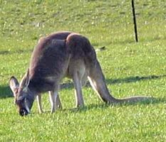 Macropus rufus